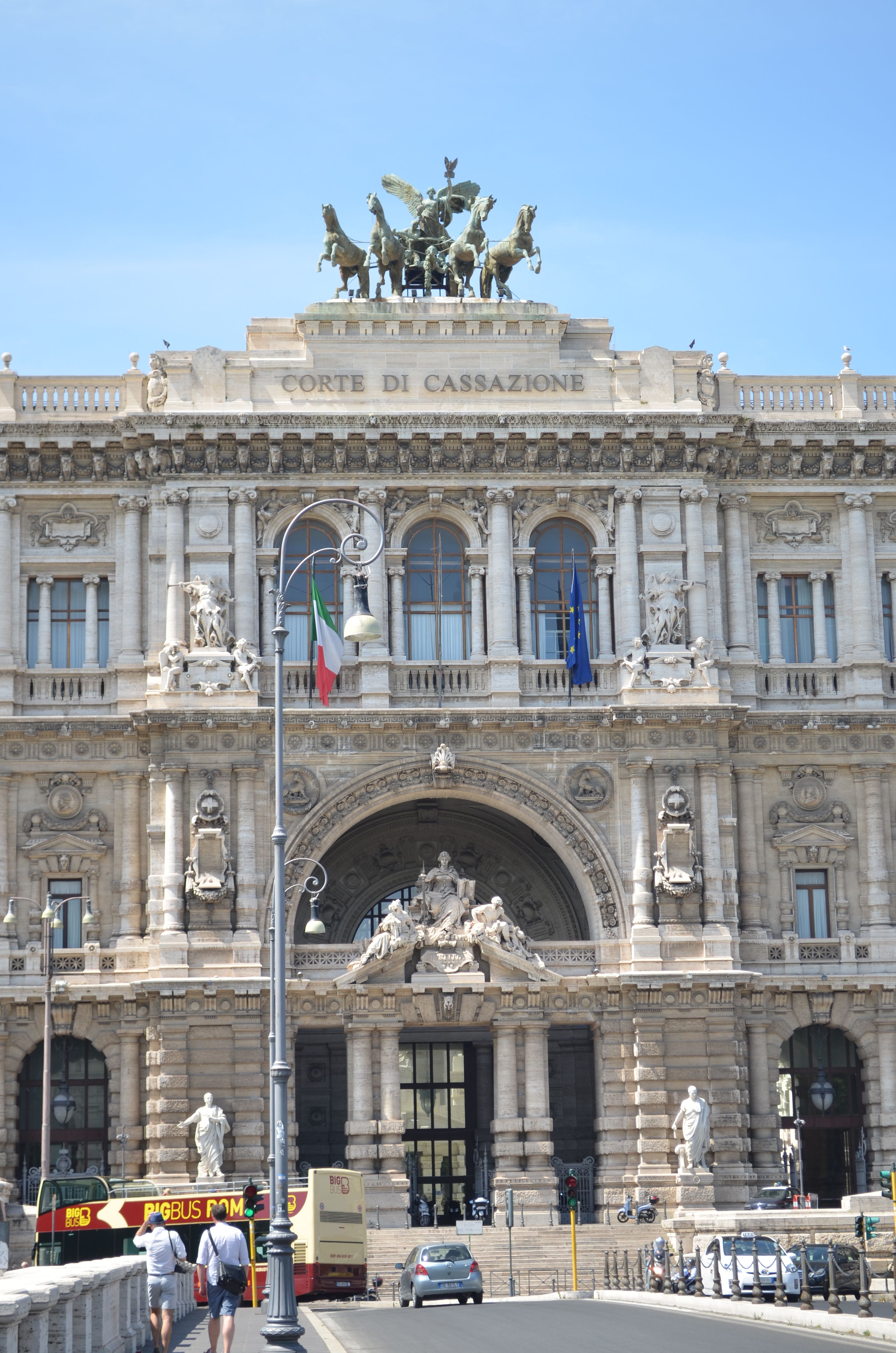 Palazzo di Giustizia (Rome)